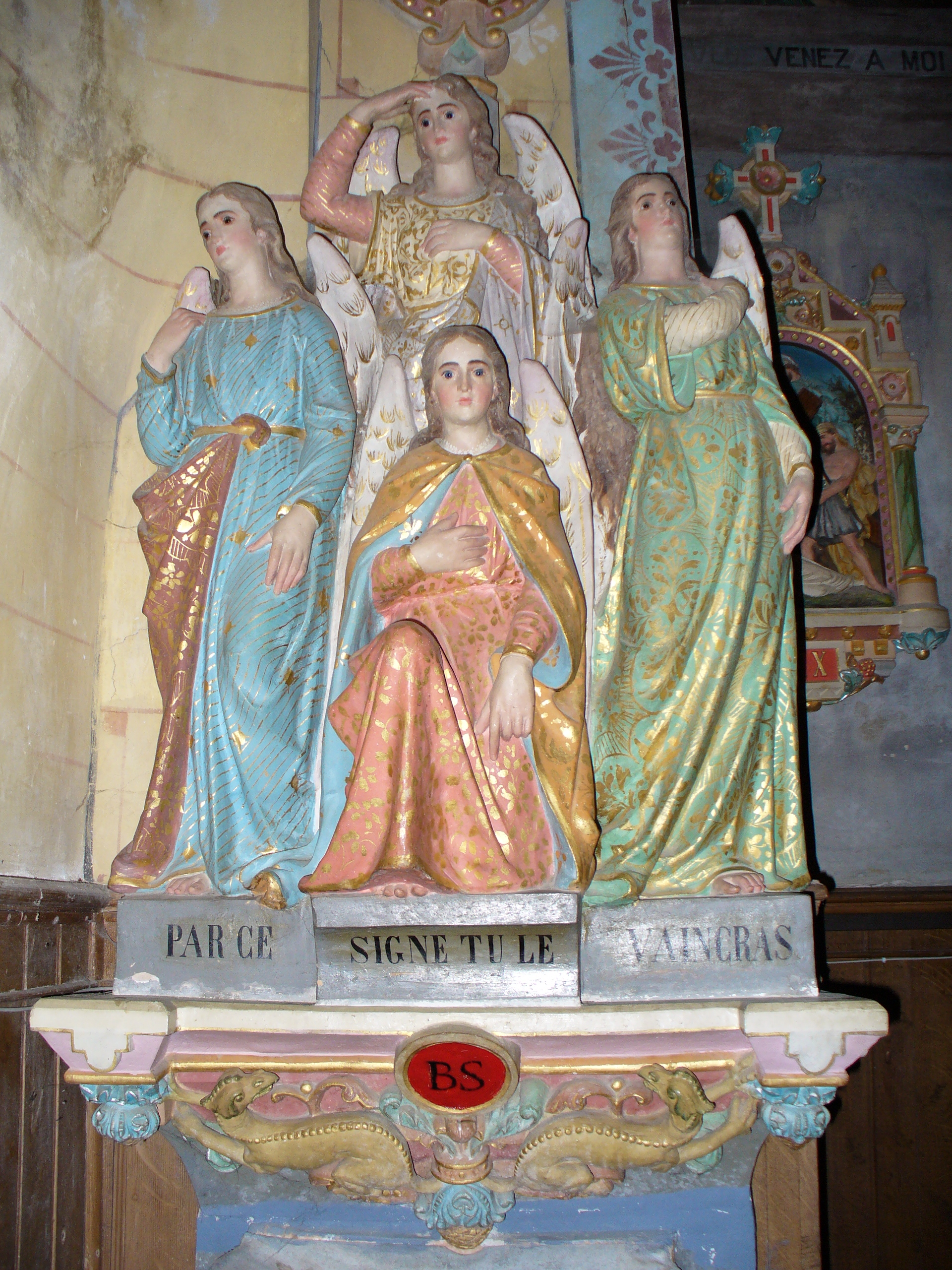 Weihwasserbecken in der Kirche von Rennes-le-Chateau; vier Engel machen das Kreuzzeichen (christlicher Ritus beim Betreten einer Kirche)